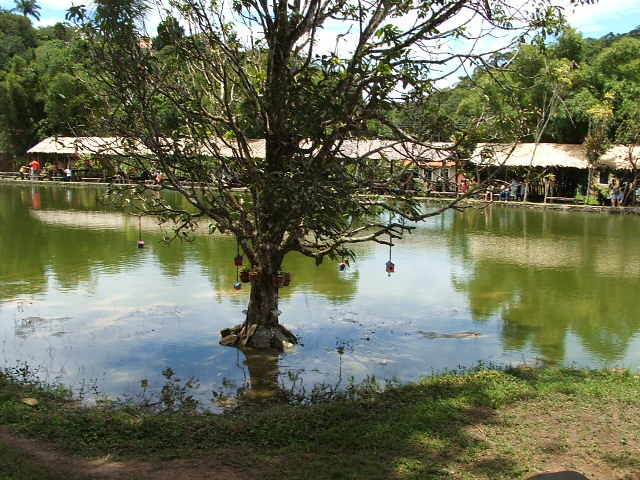 Opções em Guaramiranga - CE